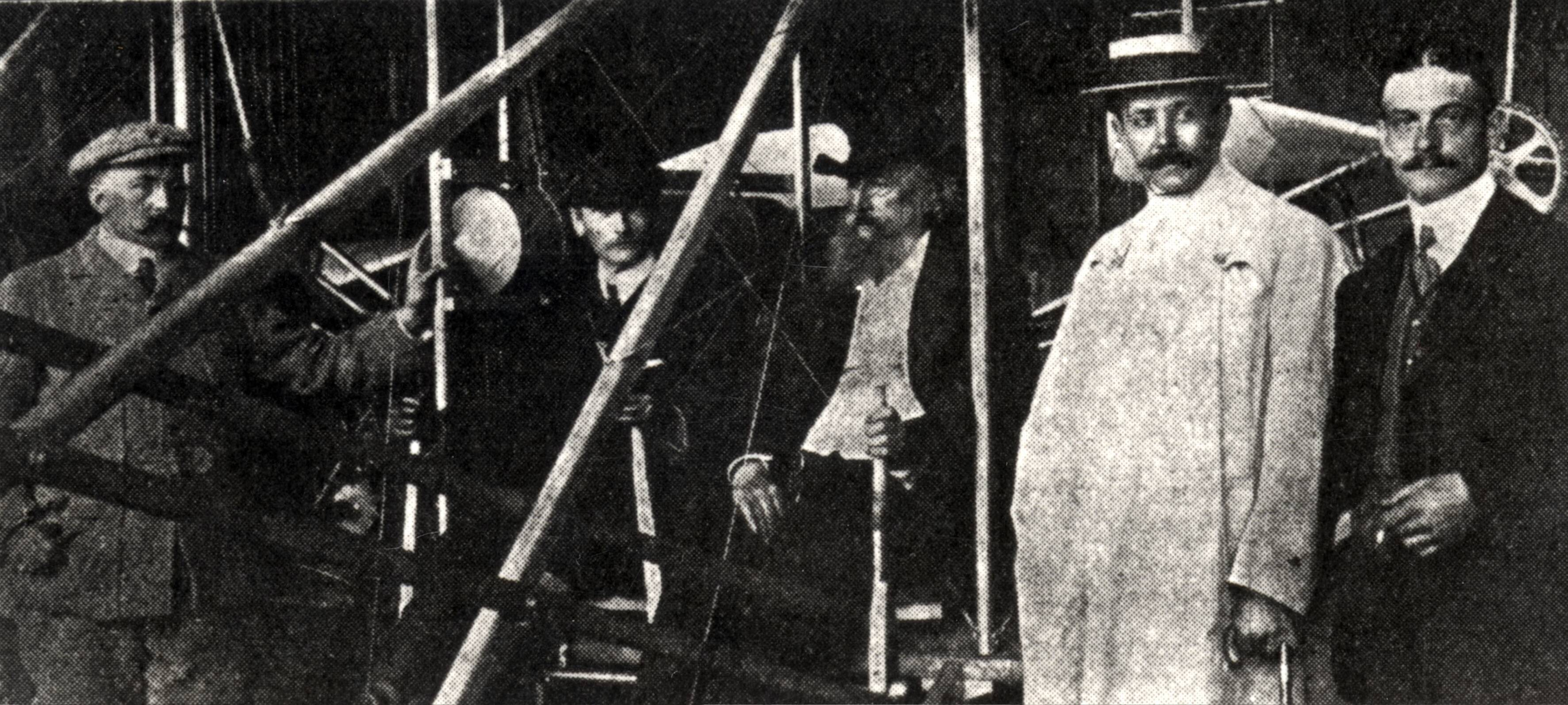 Luchtvaartgeschiedenis. De eerste vliegtocht boven Nederland 1909. Foto: 2e van links Aviateur Graaf Charles de Lambert (in de Wright-Flyer) en naast hem Heerma van Voss (de organisator), voor de vlucht over de Leursseheide, Etten-Leur 27 juni 1909.